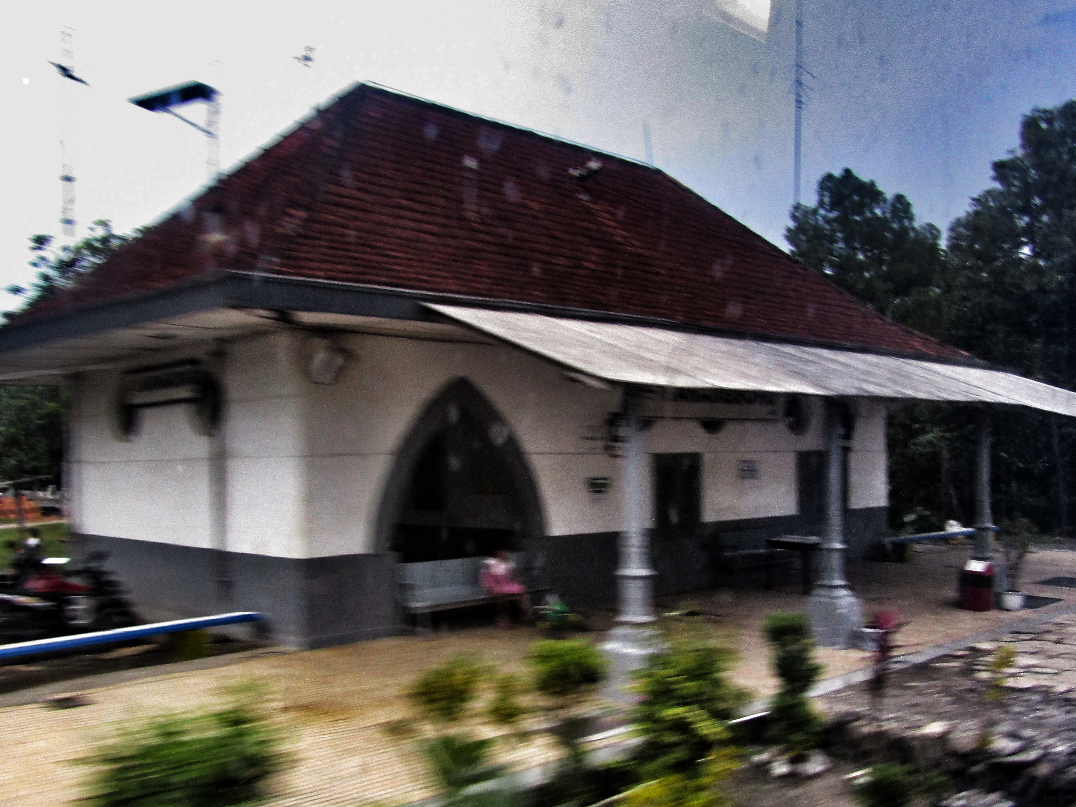 Stasiun Karangsono, 2019